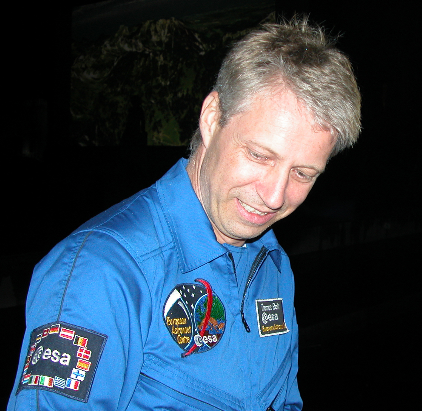 Source = Own Work Author = Bruno Barral (ByB) Paris, le 15/06/2007